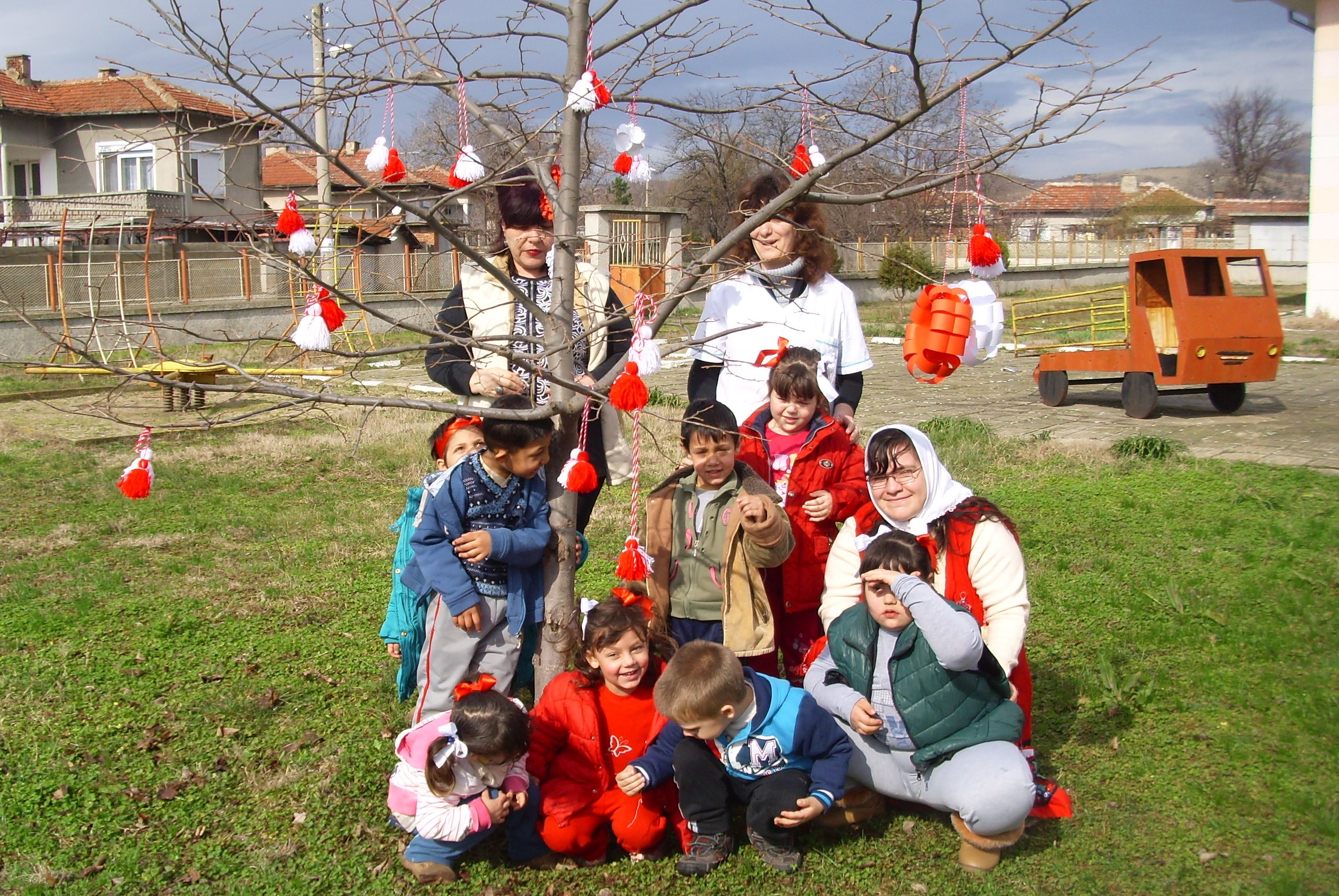 Баба Марта 2015